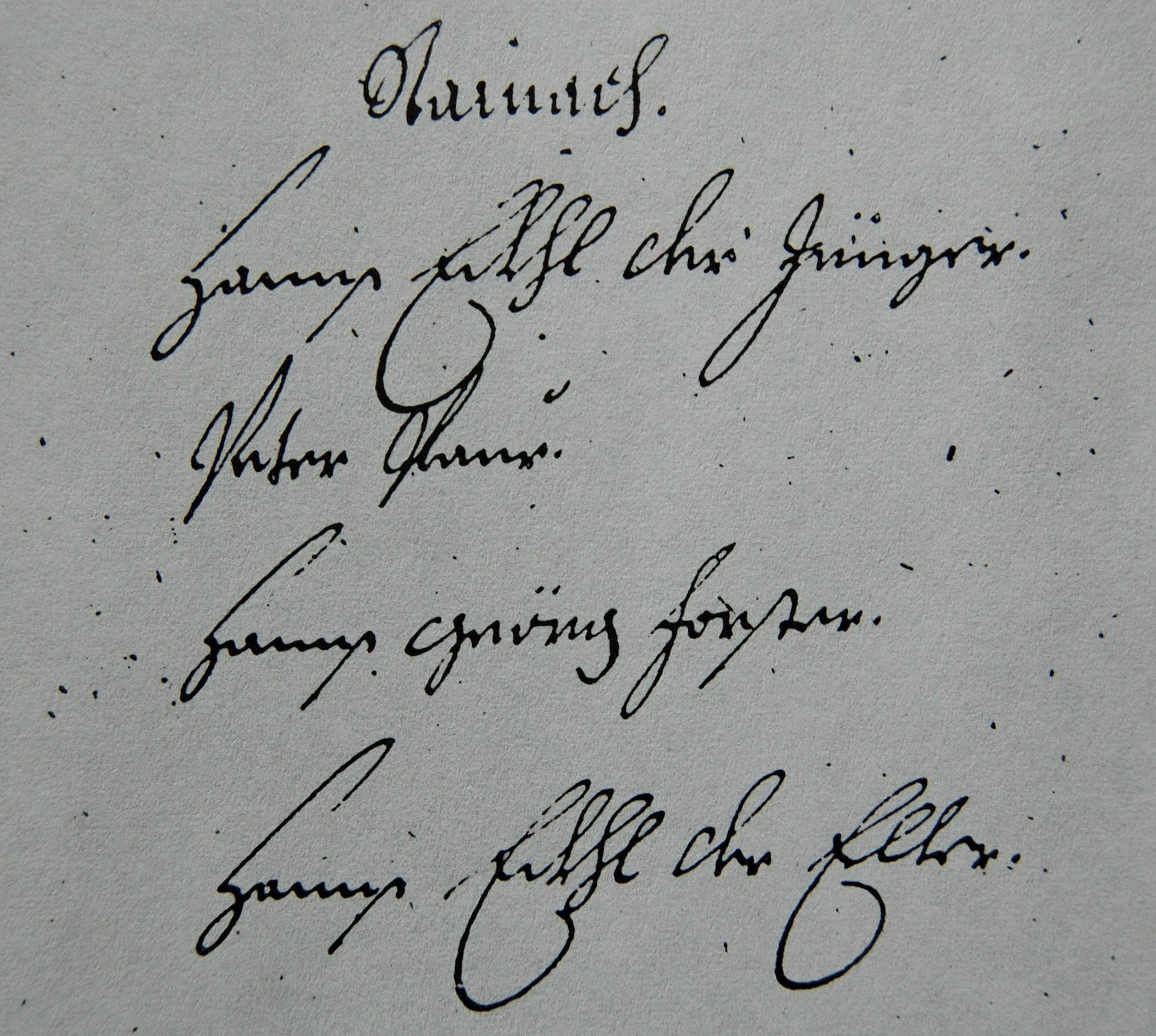 Namen der Grundholden aus Steinach